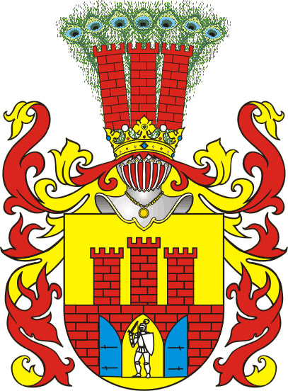 Clan Grzymala